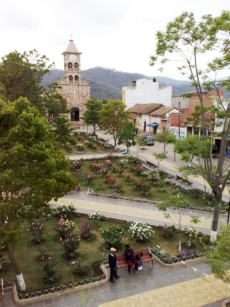 Plaza principal de Entre Ríos, Tarija, Bolivia